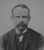 patriota, fisico, politico, accademico e rettore italiano